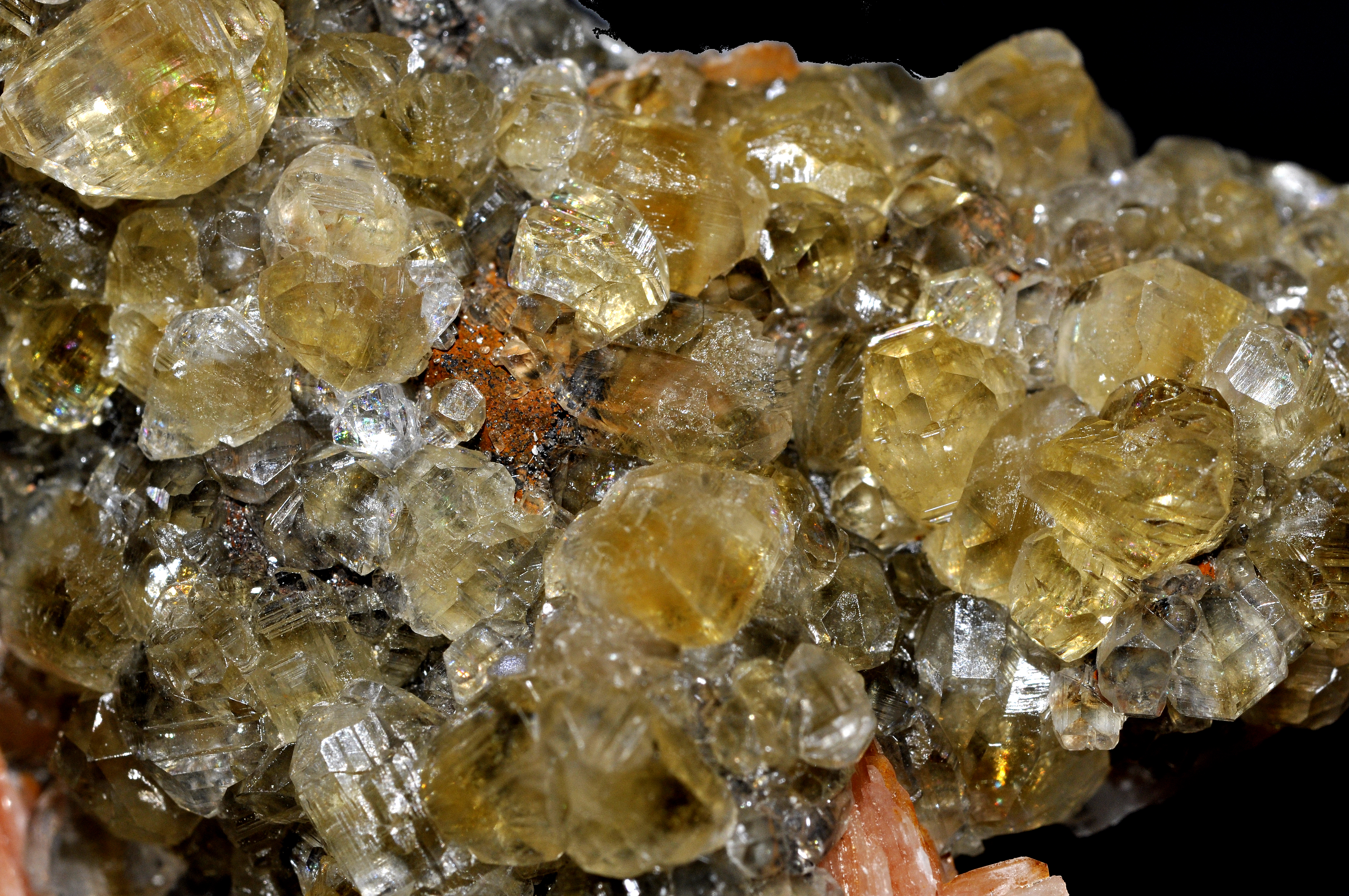 Cristaux de cérusite